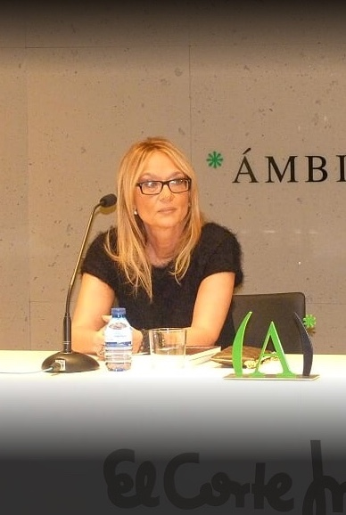 Rossana Balduzzi Gastini a Madrid presso l’Ámbito Cultural de El Corte Inglés nel 2015 per la presentazione del romanzo Life on loan